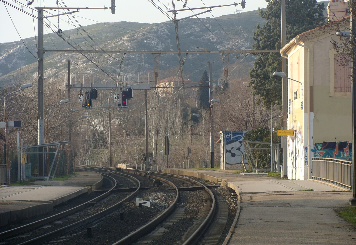 La gare de Séon Saint-Henry (Marseille), vue prise en direction de l'Estaque.